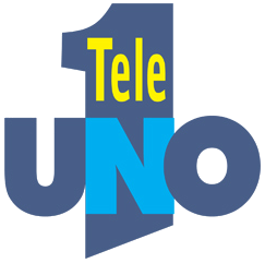 Logo Utilizado desde 1996 hasta 1998